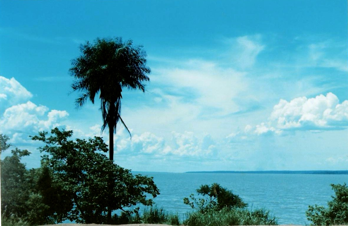 Descrição: O rio Paraná visto da Cascalheira, em Três Lagoas, Mato Grosso do Sul, Brasil. 2007.